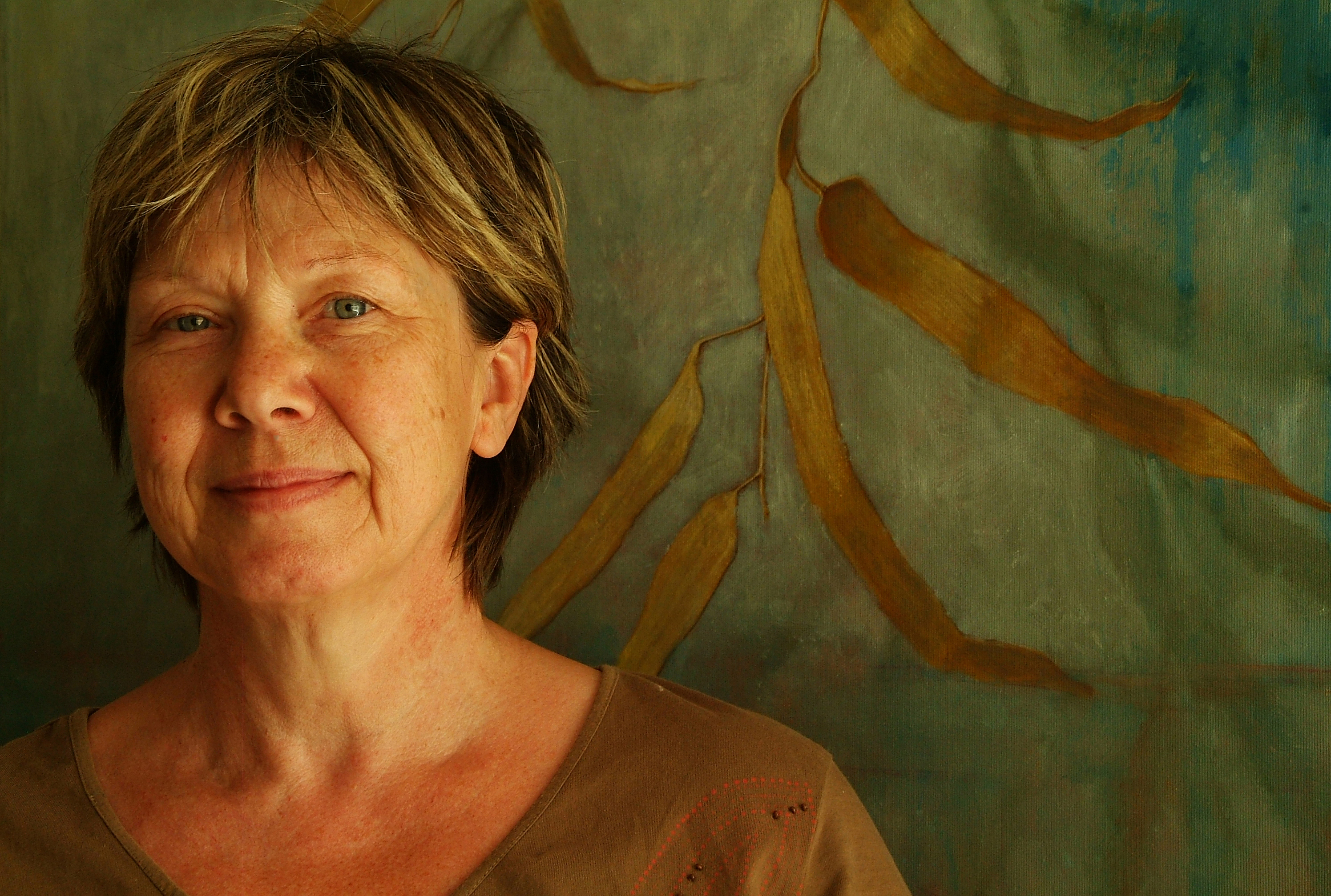 Die Malerin Angela Hennessy im abgedunkelten Treppenaufgang in ihrem Atelier ...